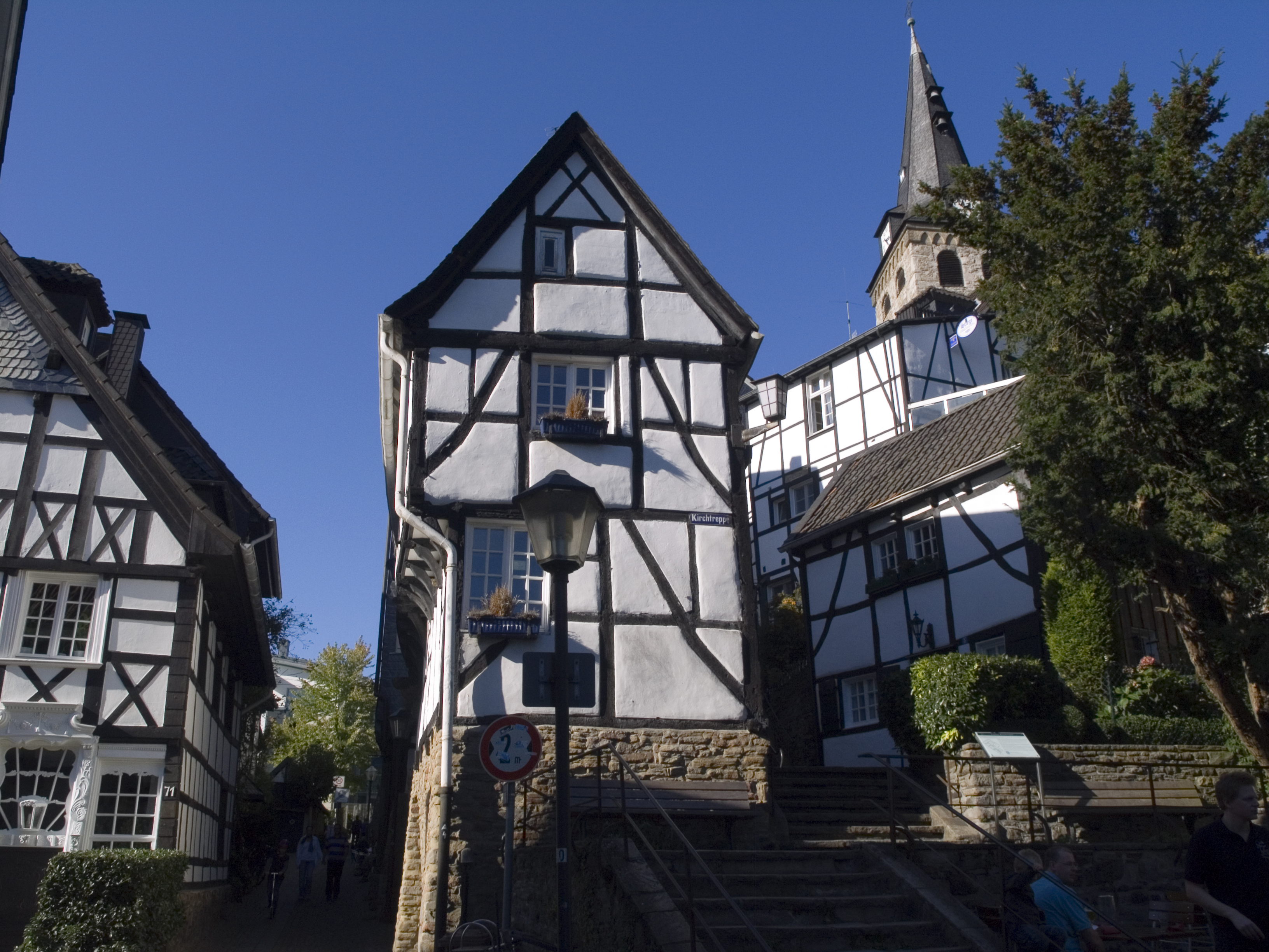 Fachwerkhäuser in Essen-Kettwig